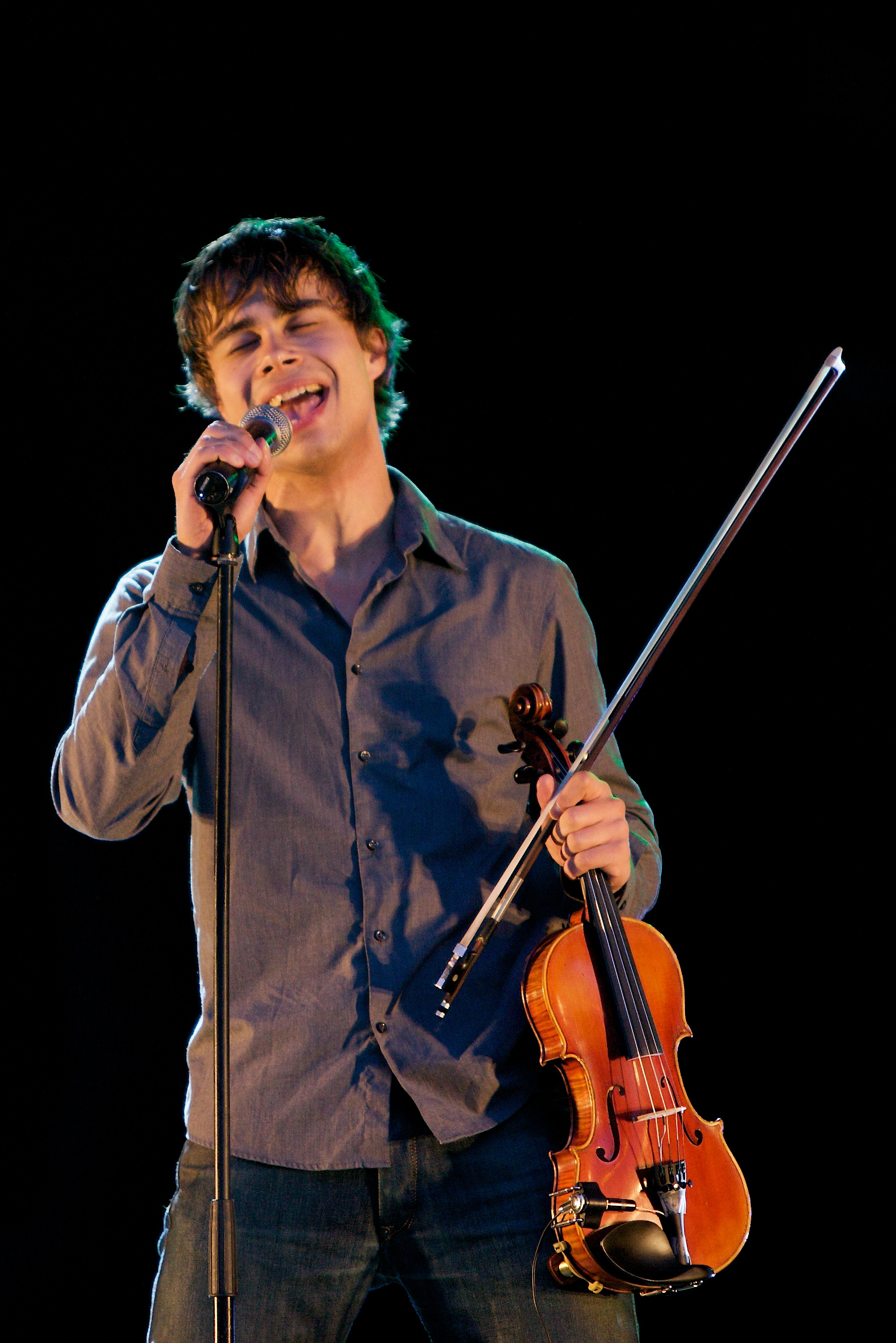 Alexander Rybak